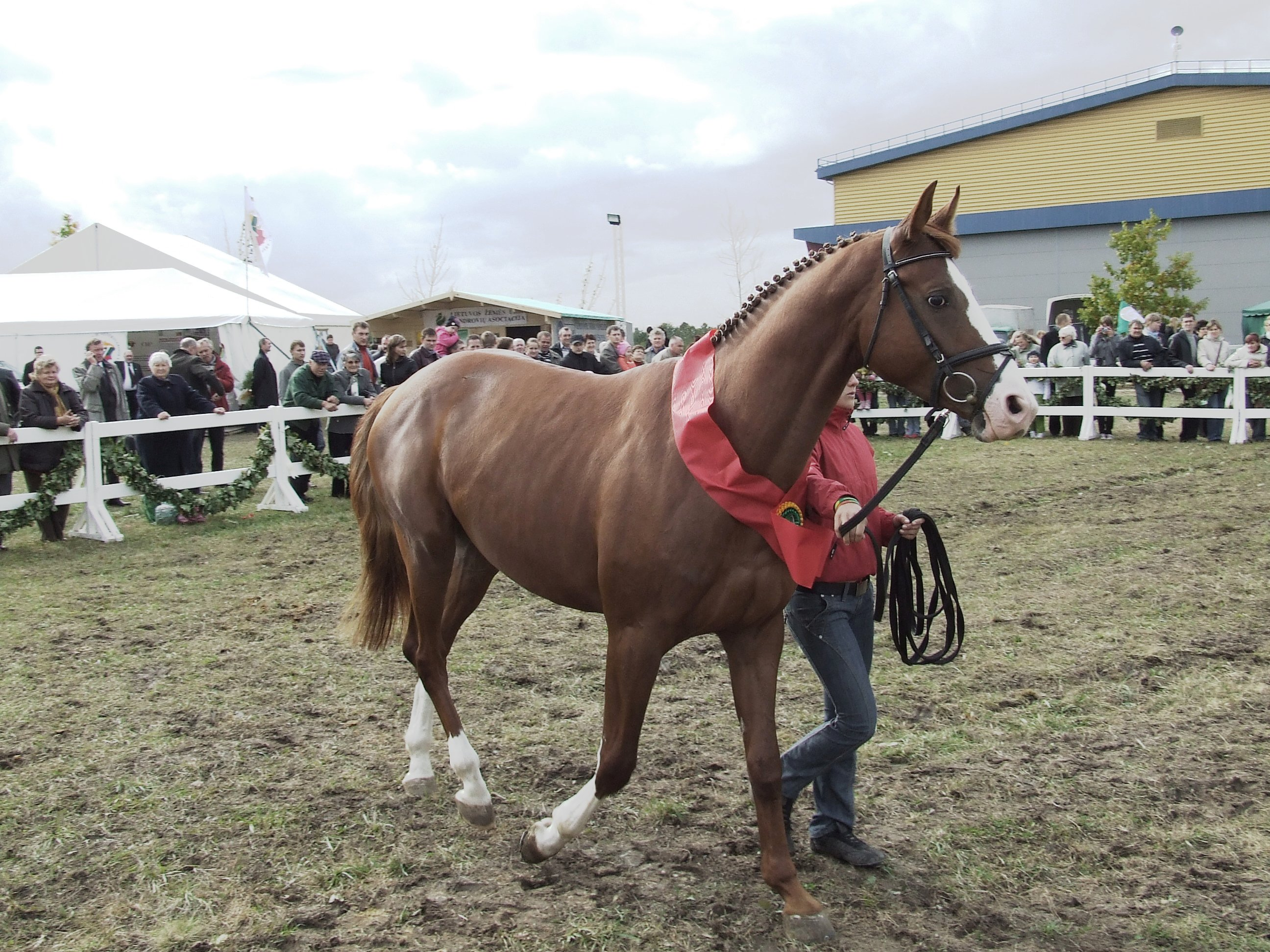 Trakehner. Lithuania.